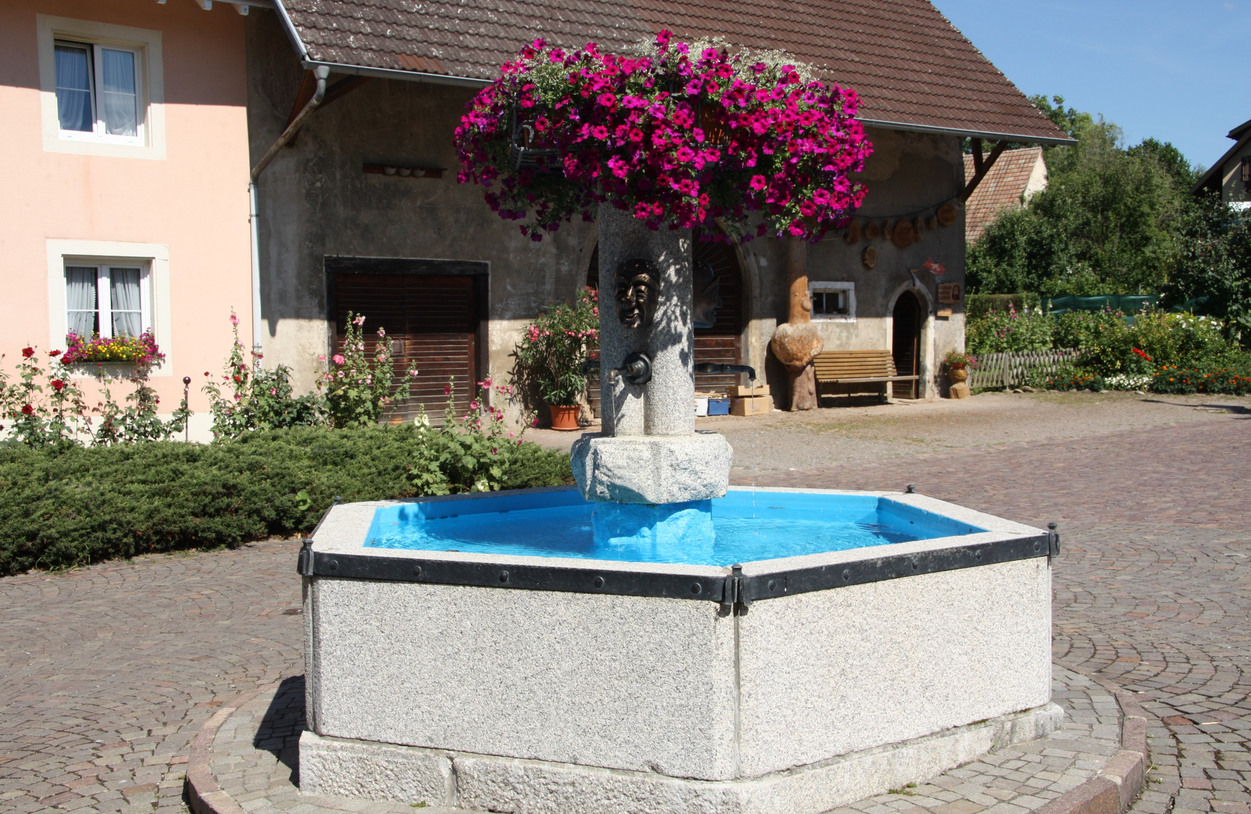 Ortschaft Reckingen, Ortsteil der Gemeinde Küssaberg im Landkreis Waldshut in Baden-Württemberg. Ortsmitte mit Brunnen. Im Hintergrund (Scheune) das Maskenmuseum.